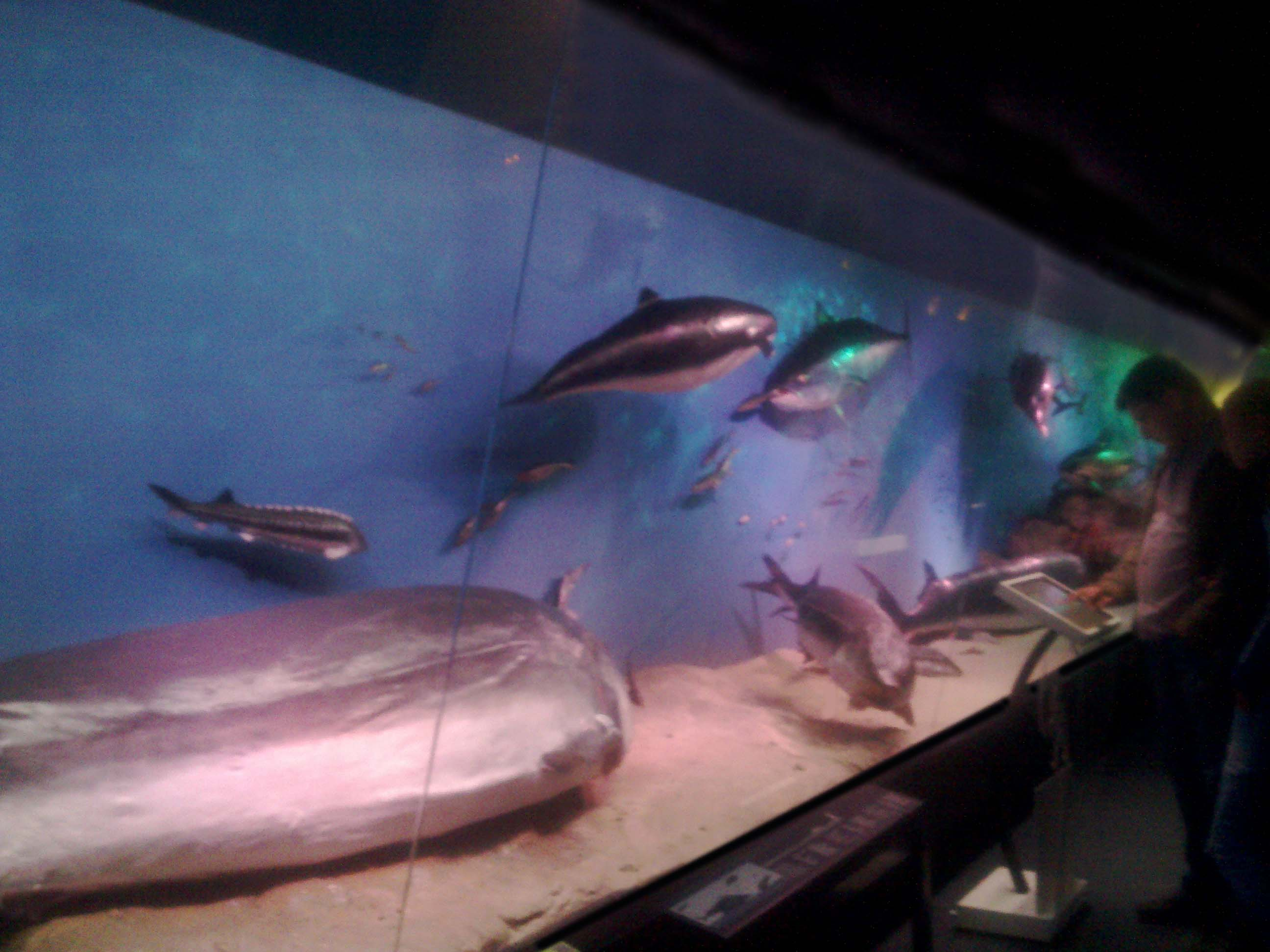 Aspect din Muzeu, foto Cepleanu, cu învoirea domnului D. Murariu